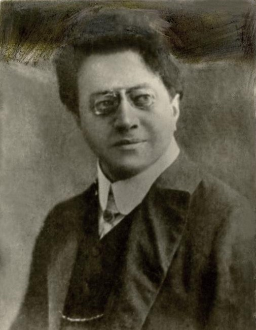 Václav Kliment (1863 - 1918), Český operní pěvec.